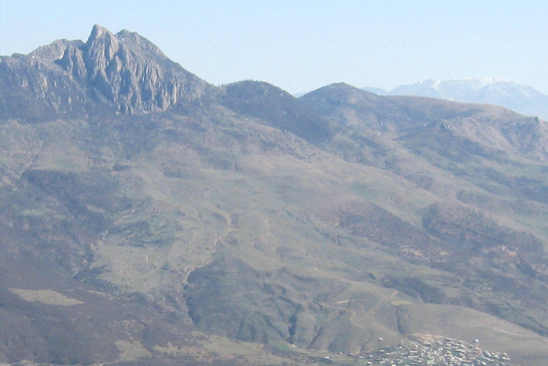 قله‌ی شاهدژ و روستای لنگر